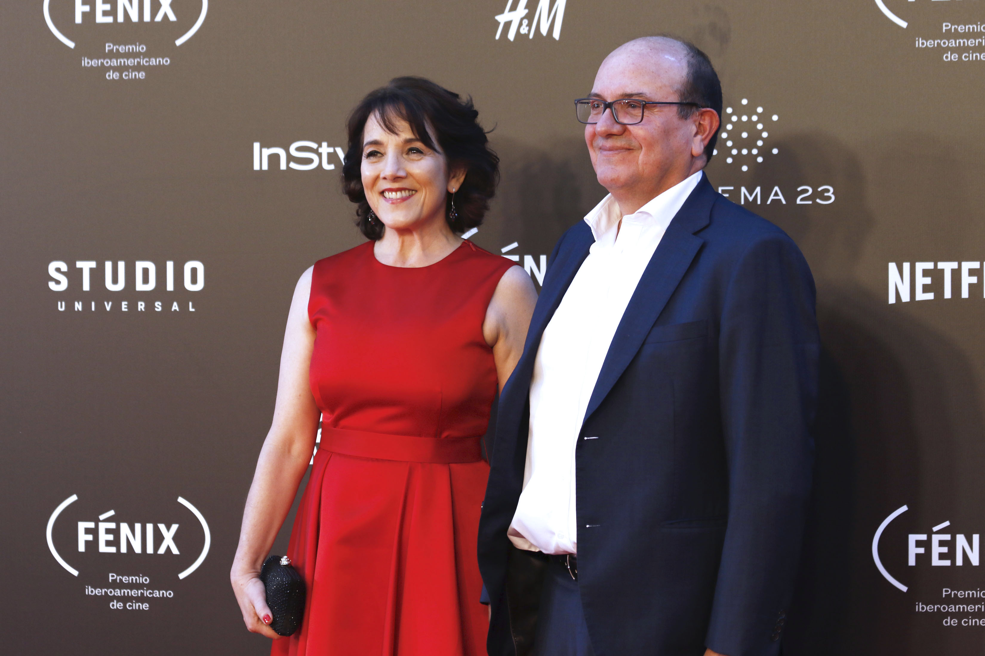 Miércoles 6 de diciembre de 2017 En el Teatro de la Ciudad Esperanza Iris, se realizó la 4ª Entrega del Premio Iberoamericano de Cine, Fénix, previo a la ceremonia, nominados, conductores, presentadores y elencos, desfilaron por la alfombra roja.Fotografía: Milton Martínez / Secretaría de Cultura CDMX